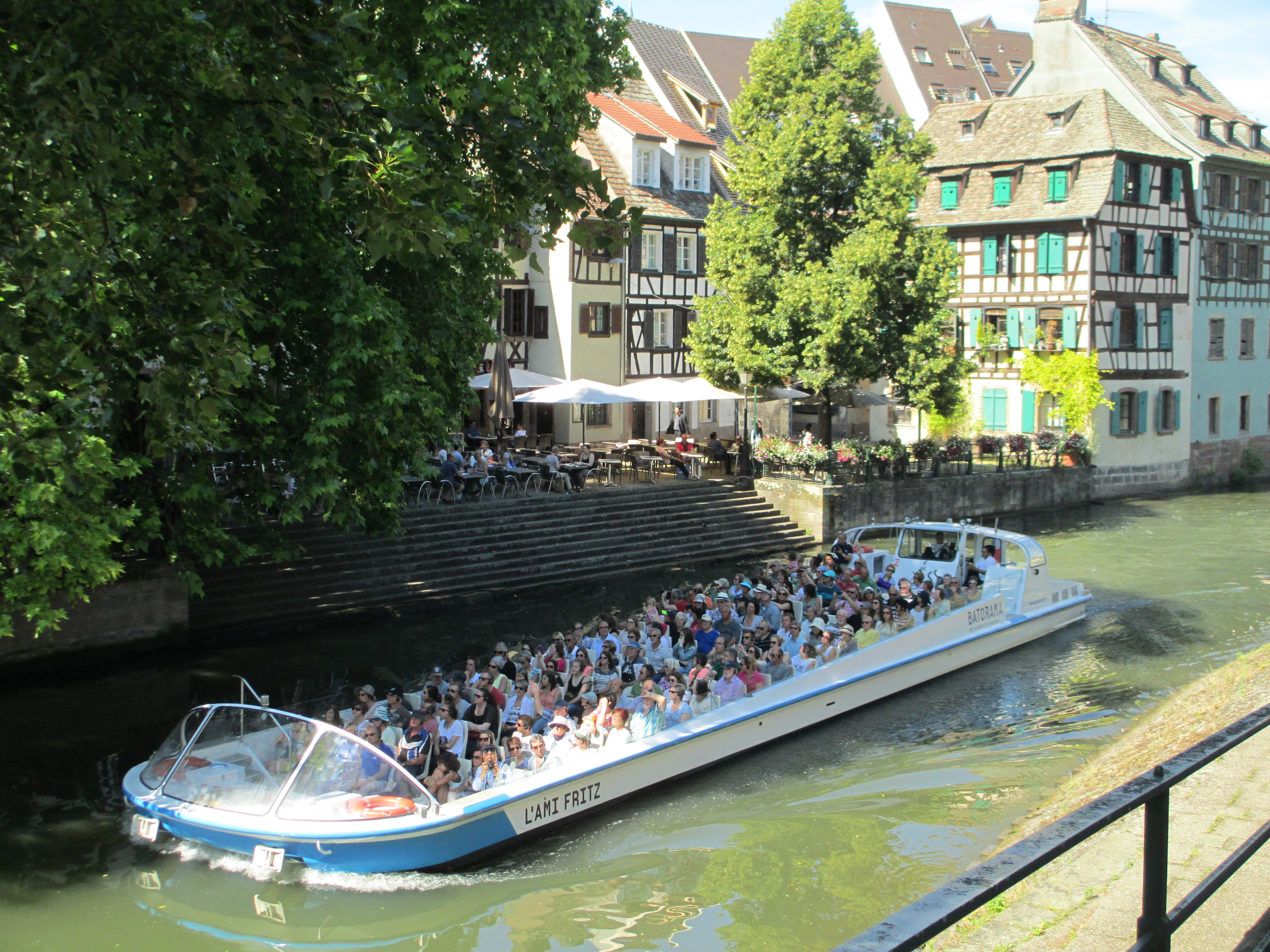 סירת תיירות בצרפת הקטנה בשטרסבורג